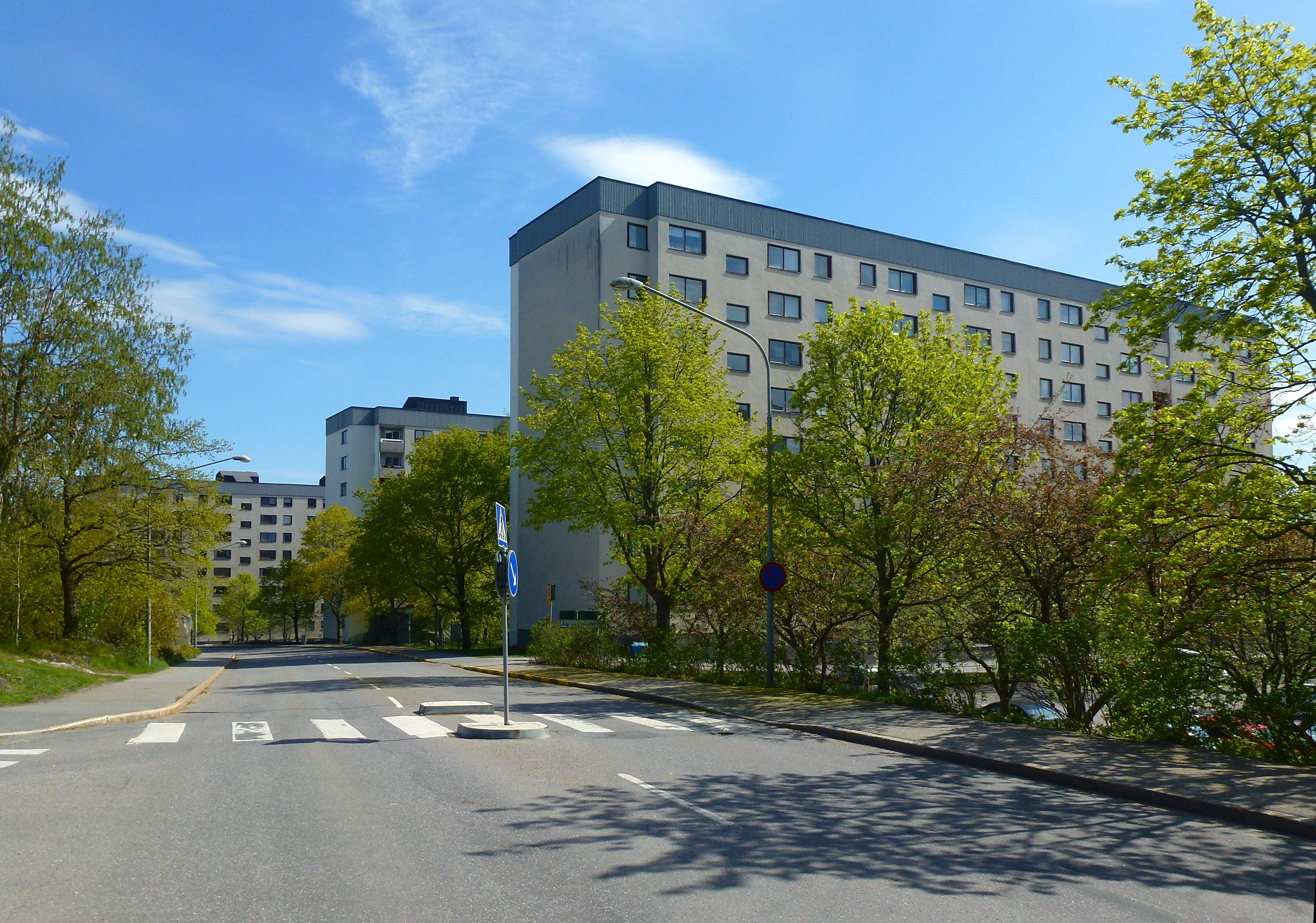 Skivhus vid Ålgrytevägen Bredäng, arkitekt Bertil Karlén